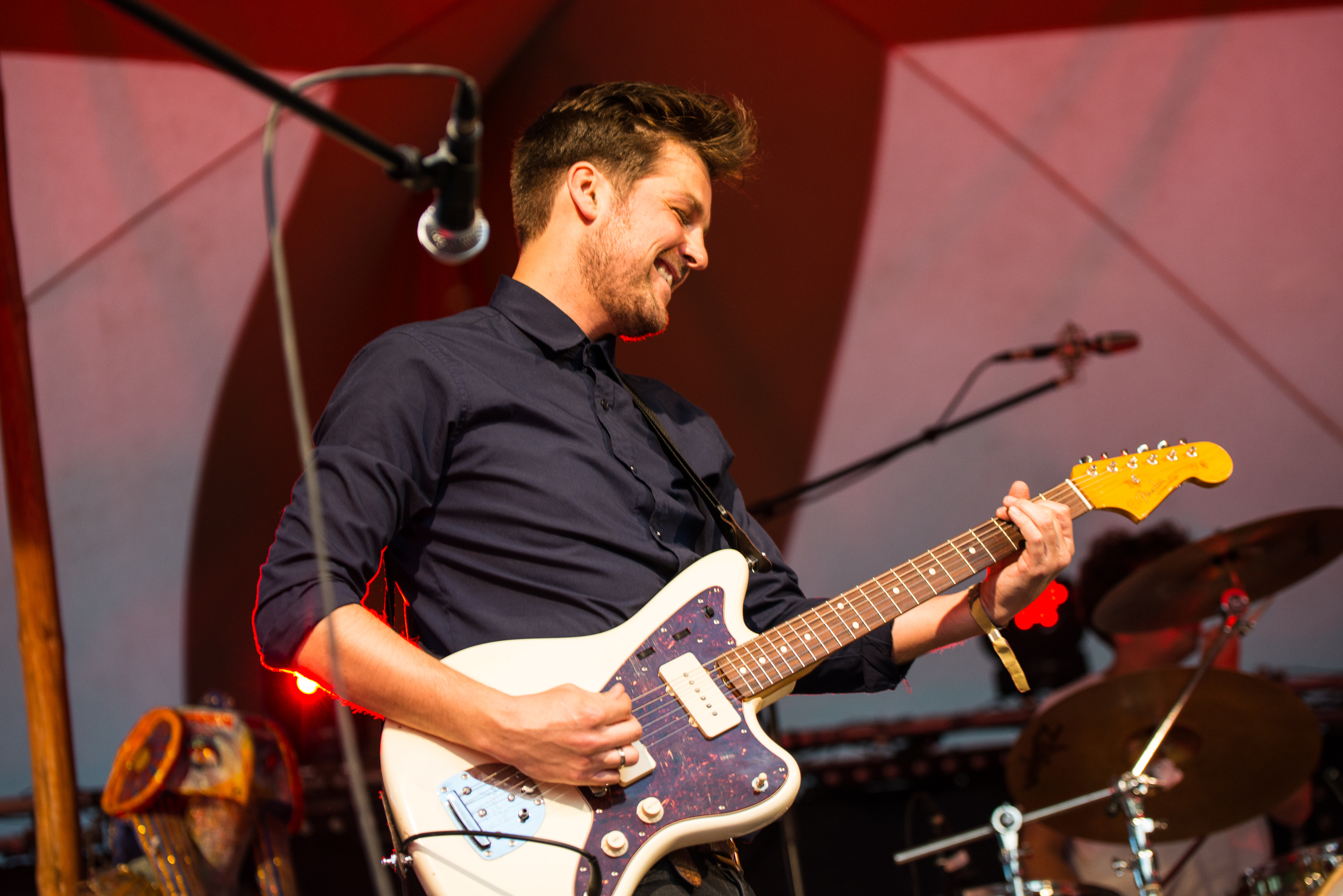 de